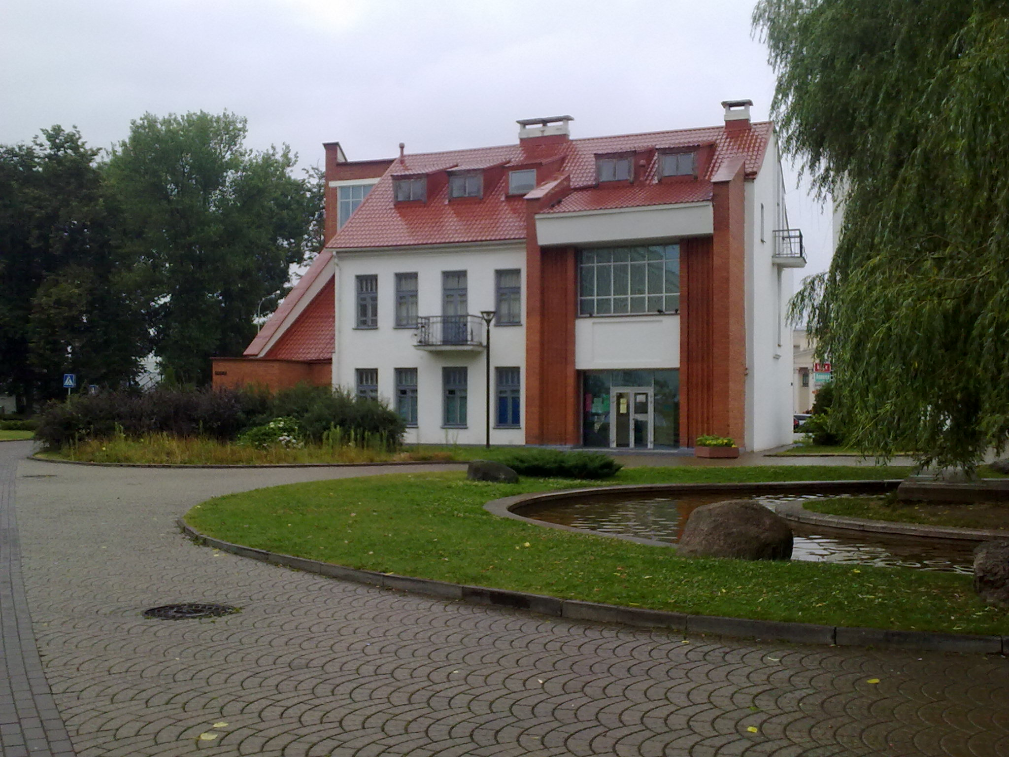 Мінск. Гістарычны цэнтр. 2012